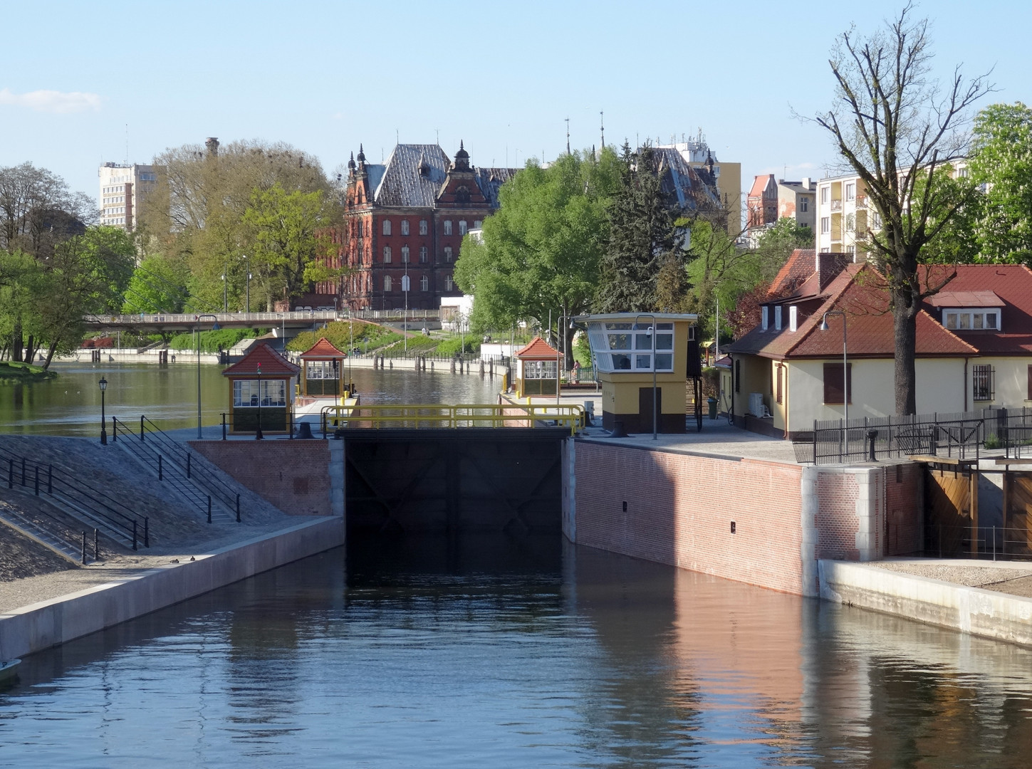 Śluza Miejska w Bydgoszczy na rzece Brdzie, ul. Marcinkowskiego